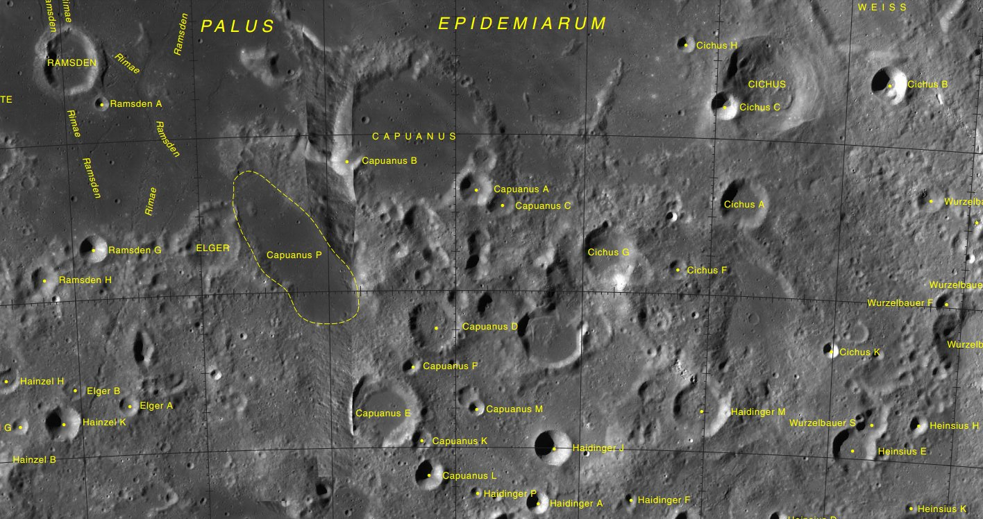 Cráter Cichus (LRO)